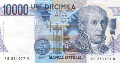 کرنسی نوٹ پر وولٹا کی تصویر